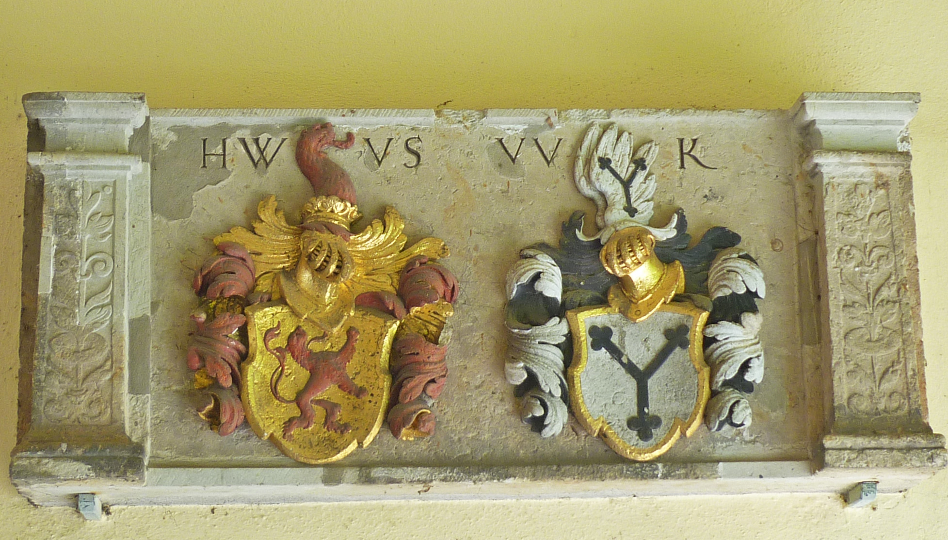 Pulsnitz, Wappen am Schlosstor (Hans Wolf von Schönberg und seine Ehefrau Ursula von Carlowitz)